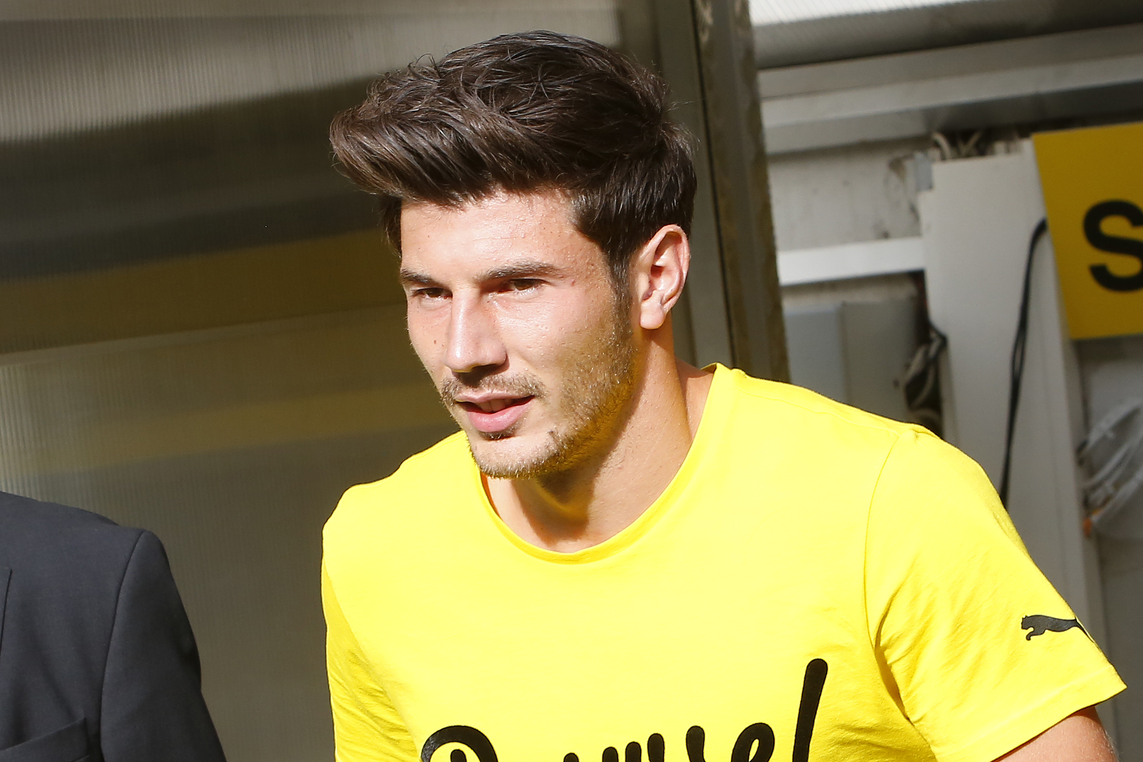 Milos Jojic bei der Mannschaftsvorstellung von Borussia Dortmund am 09.08.2014 im Signal Iduna Park